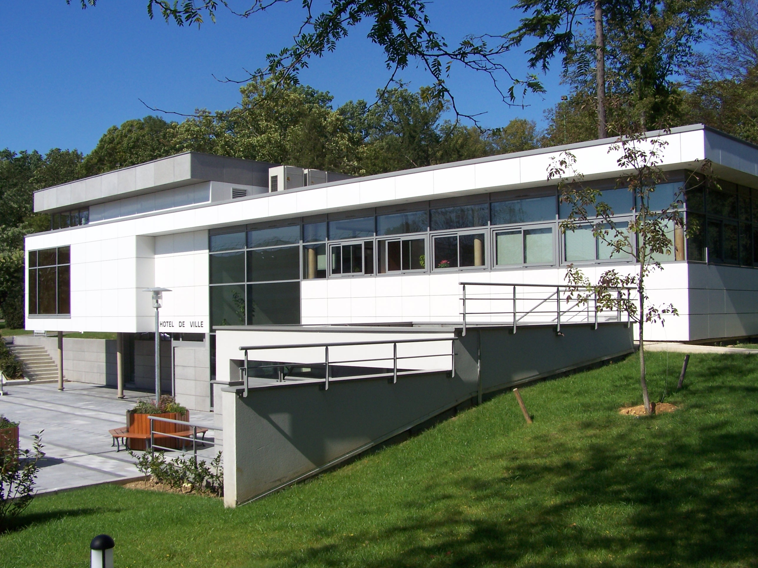 Mairie de Rocquencourt (Yvelines, France)